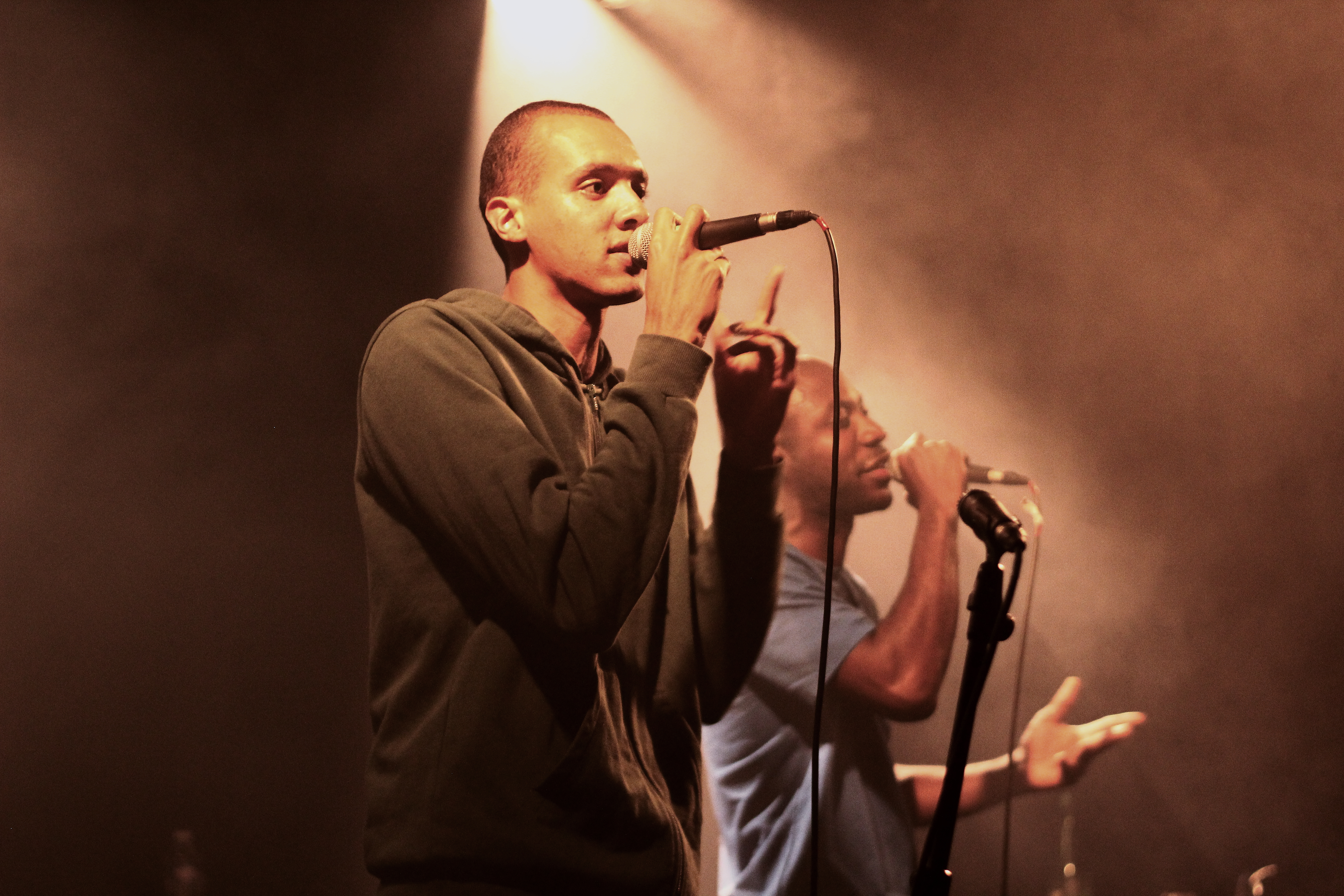 Gaël Faye (Milk Coffee and Sugar) à la release party de l'album Hip Hop after all de Guts, en septembre 2014